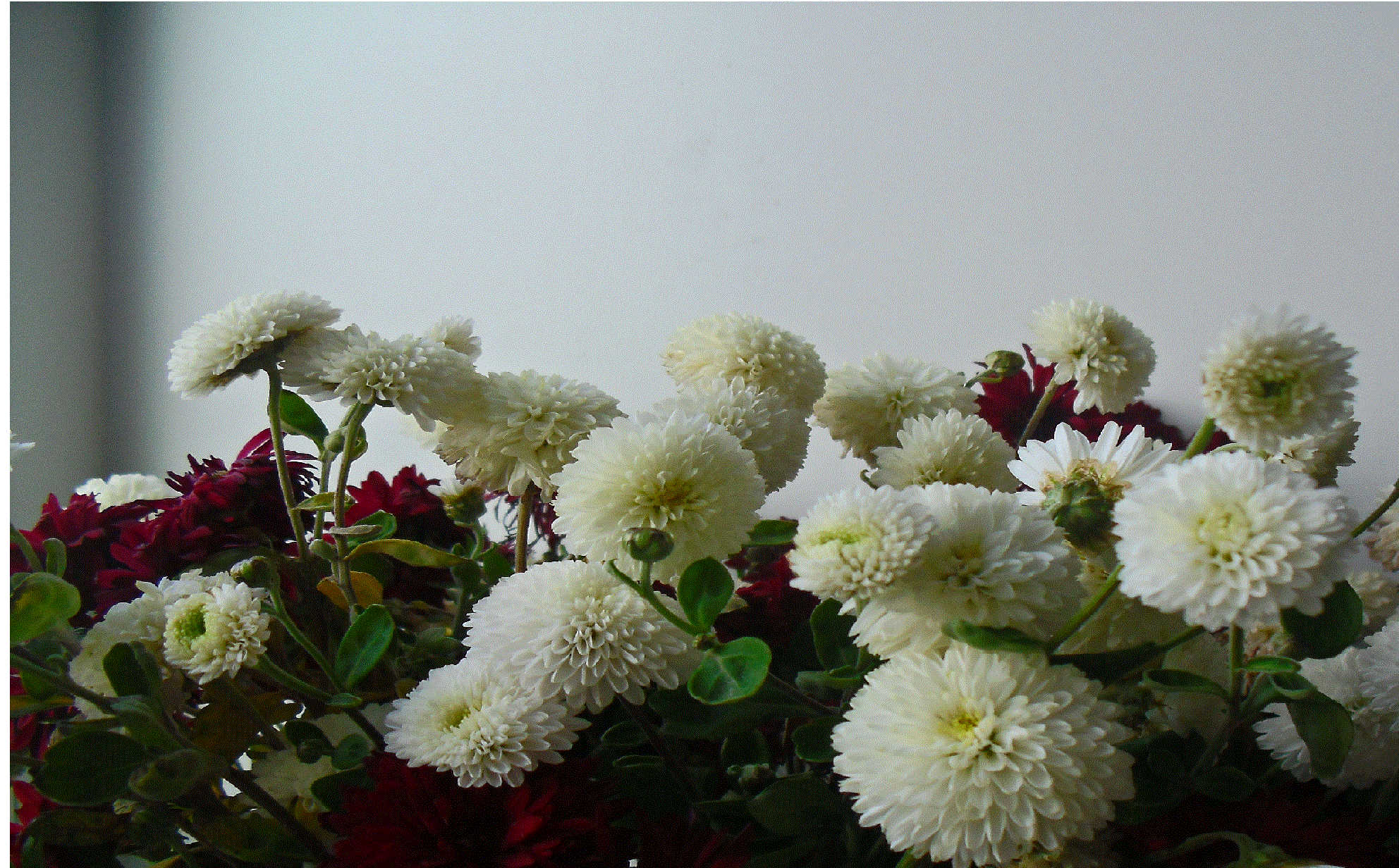 Цветы букет в формате gif .